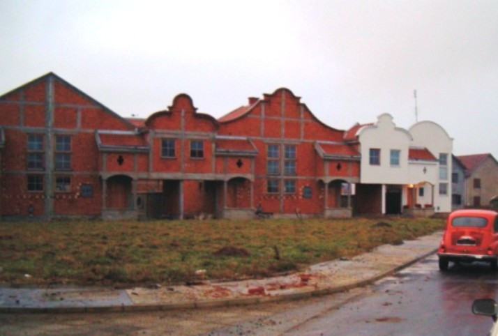 Совљак